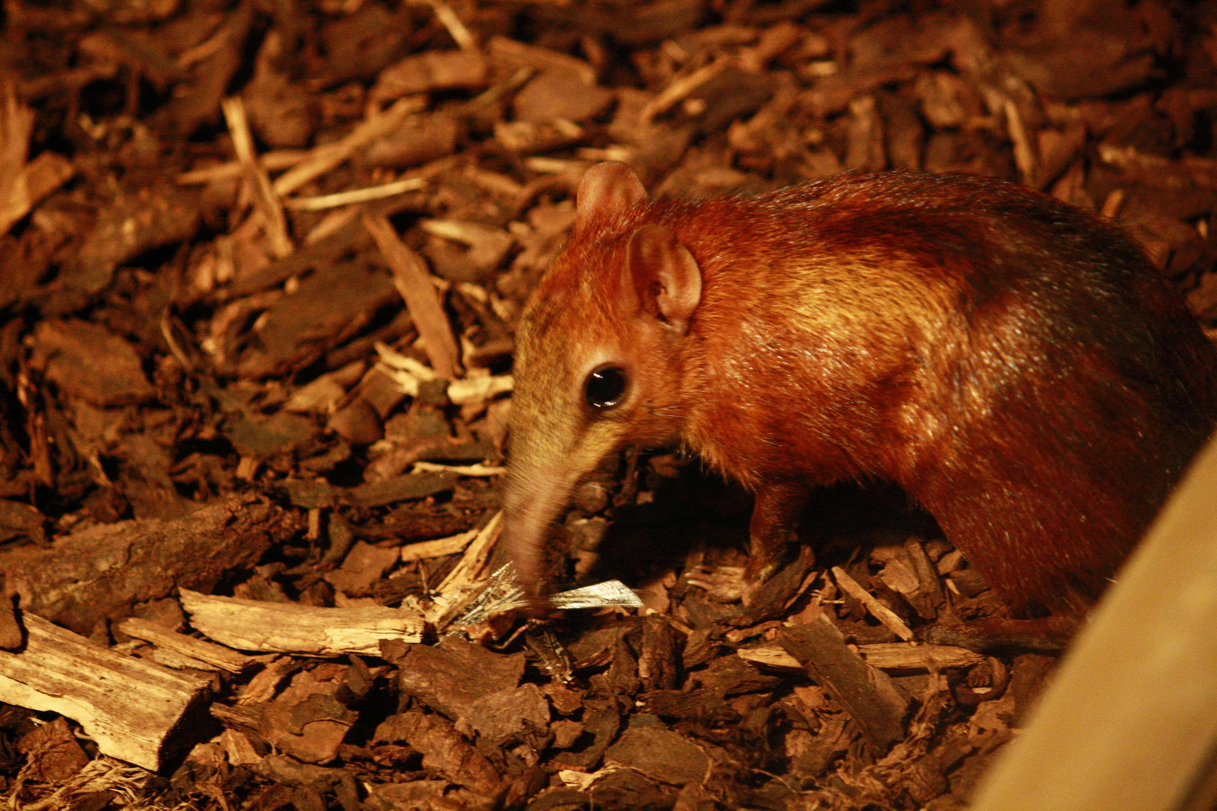 Zoo Praha